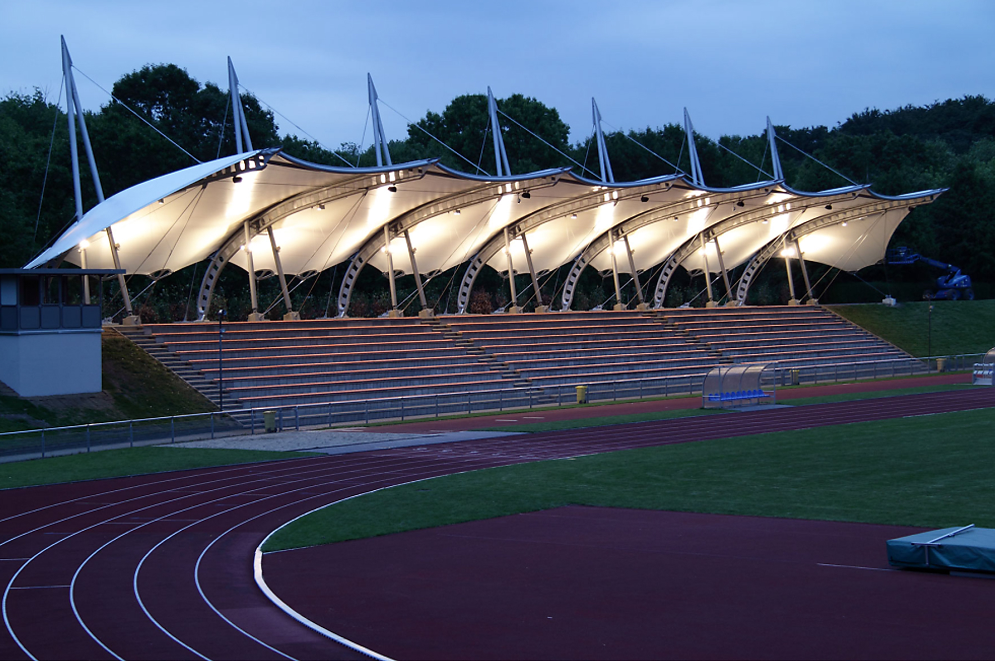 Das beleuchtete Gladbecker Stadion in der Nacht